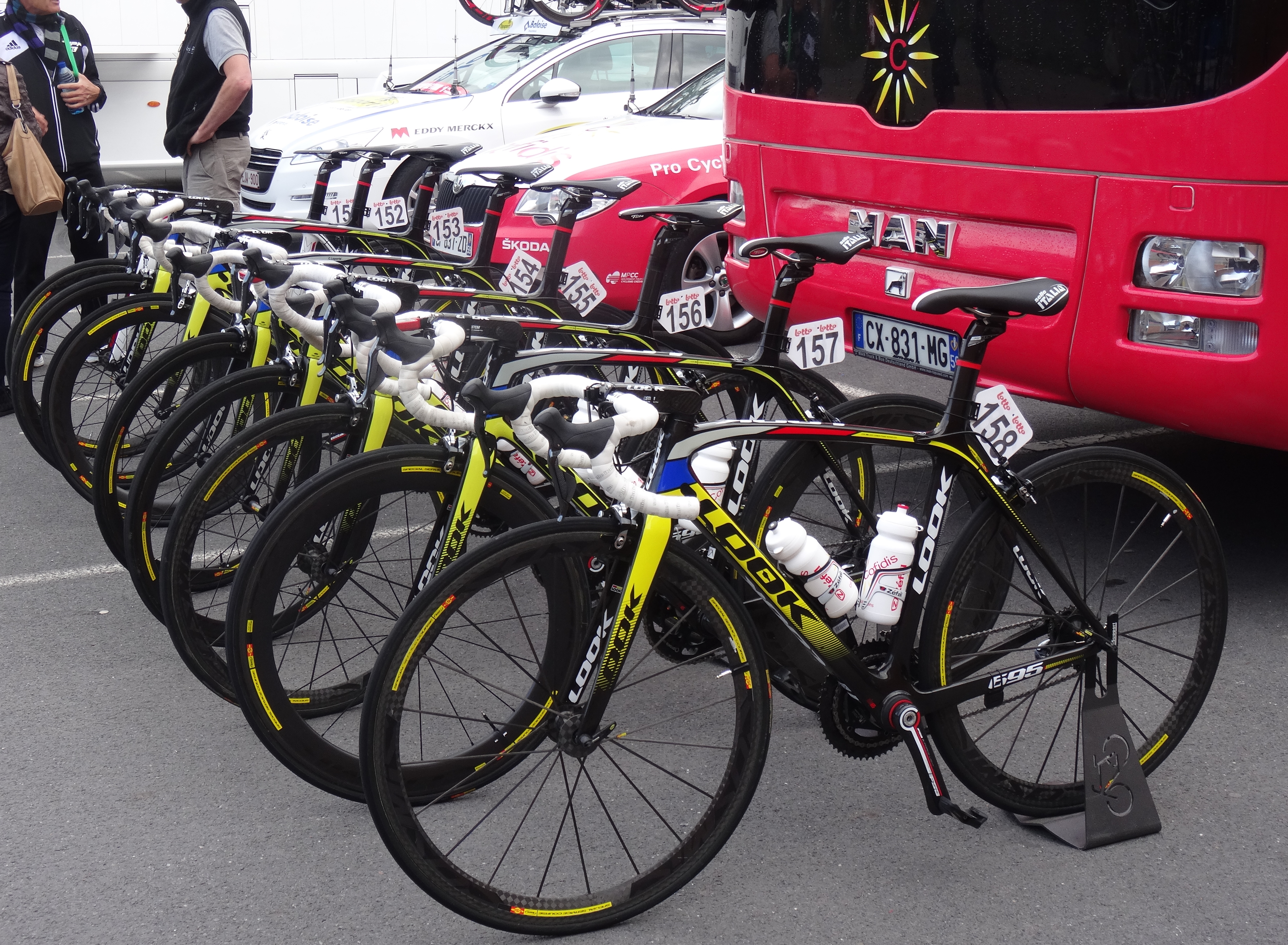 Reportage photographique réalisé le jeudi 2 octobre à l'occasion du départ de la première étape de l'Eurométropole Tour 2014 à La Louvière, Belgique.